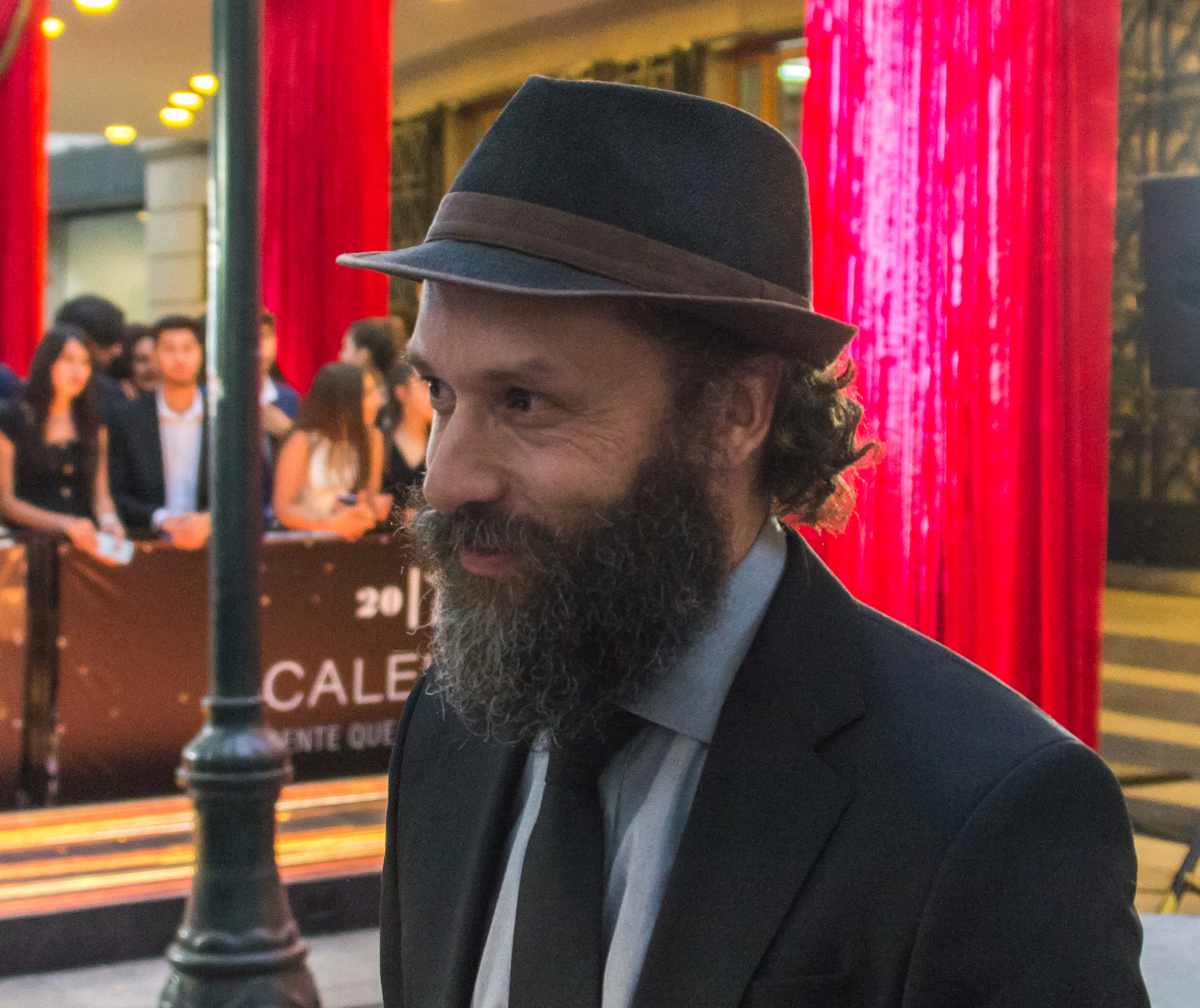 Andrés Velasco, Premios Caleuche, Teatro Oriente, Providencia, Santiago, Región Metropolitana de Santiago, Chile.